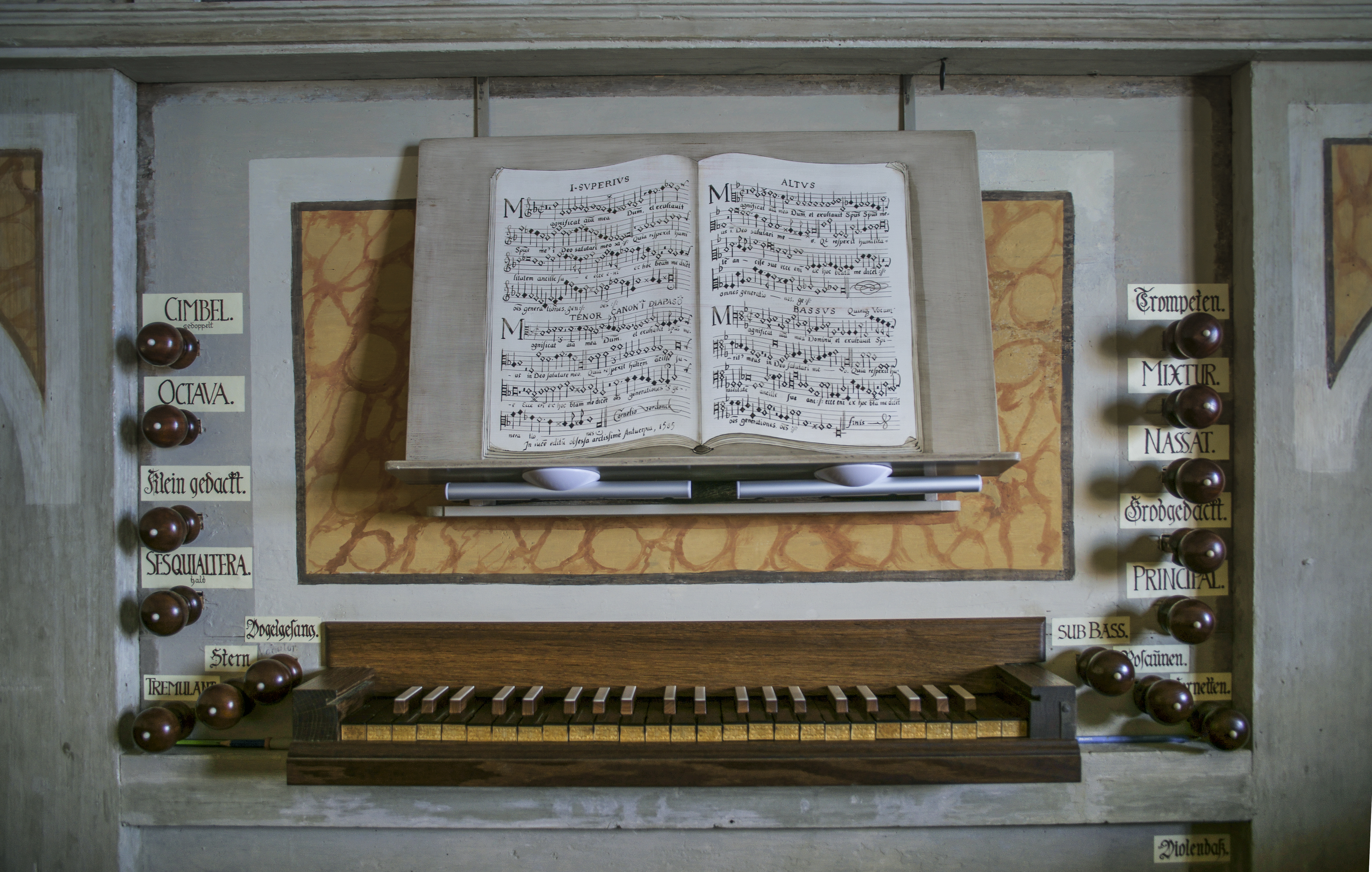 Orgel der Wehrkirche Pomßen, Gemeinde Parthenstein, Landkreis Leipzig, Sachsen, Deutschland